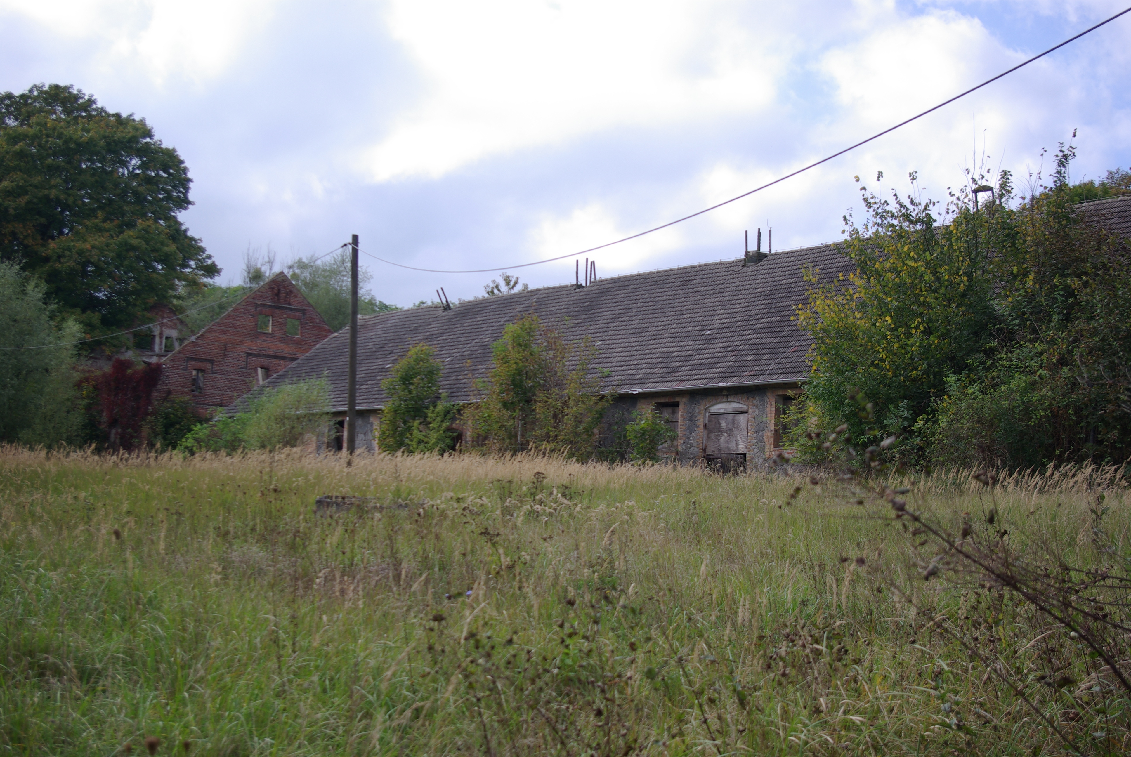 Bad Freienwalde Ortsteil Sonnenburg in Brandenburg. Zu dem Gut gehören auch Pferdeställe. Diese verfallen, obwohl sie unter Denkmalschtutz stehen.